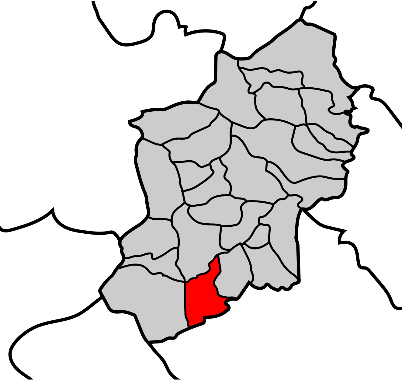 Mapa de la parroquia de Ferreiros de Valboa ayuntamiento de Becerreá